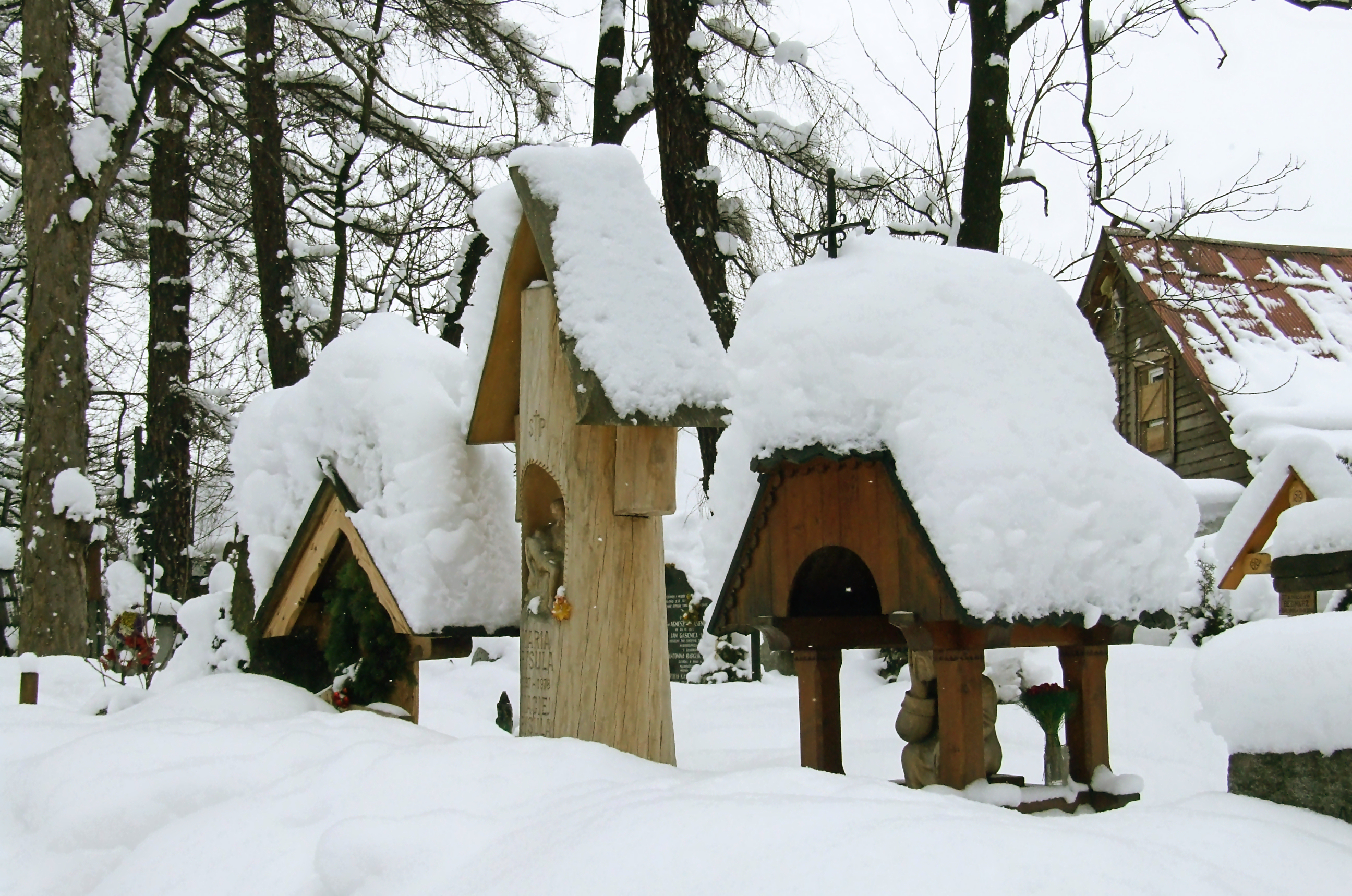 Zakopane, cmentarz na Pęksowym Brzysku